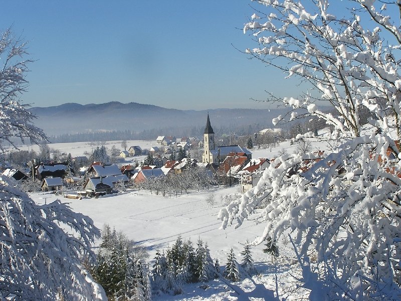 Pogled na Ravnu Goru zima